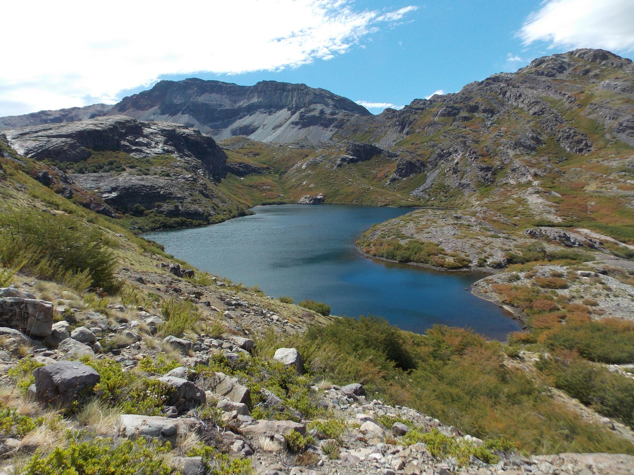 Laguna El Baúl, interior de Pichirrincón y Las Tragedias, Cordillera de la Mortandad. En San Fabián de Alico, Región del Bío Bío, Chile.